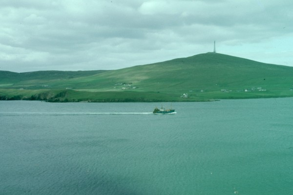 Höchste Erhebung auf Bressay (Shetlandinseln) mit Fernmeldemast